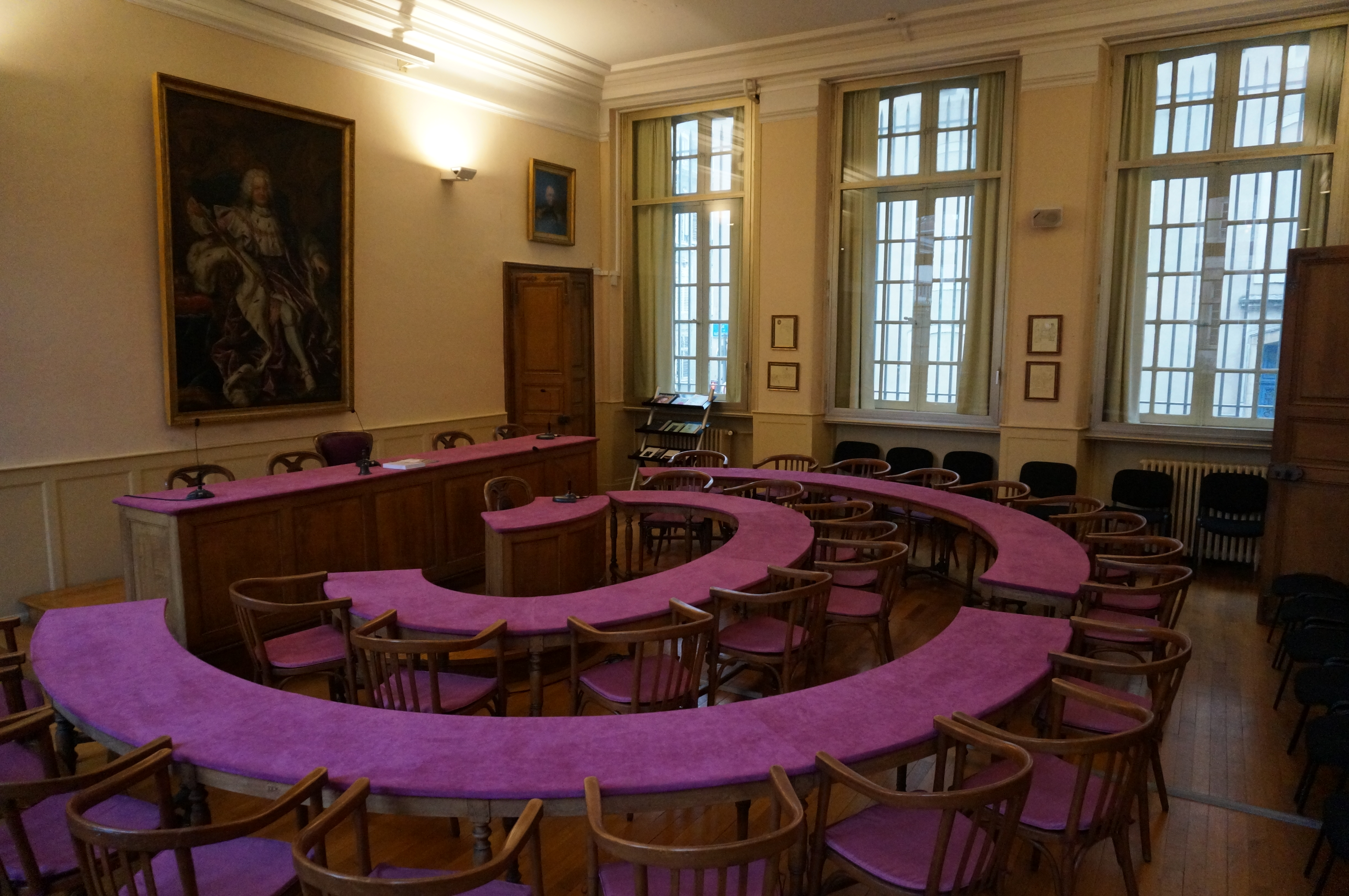 Mois international de la contribution francophone à Nancy.